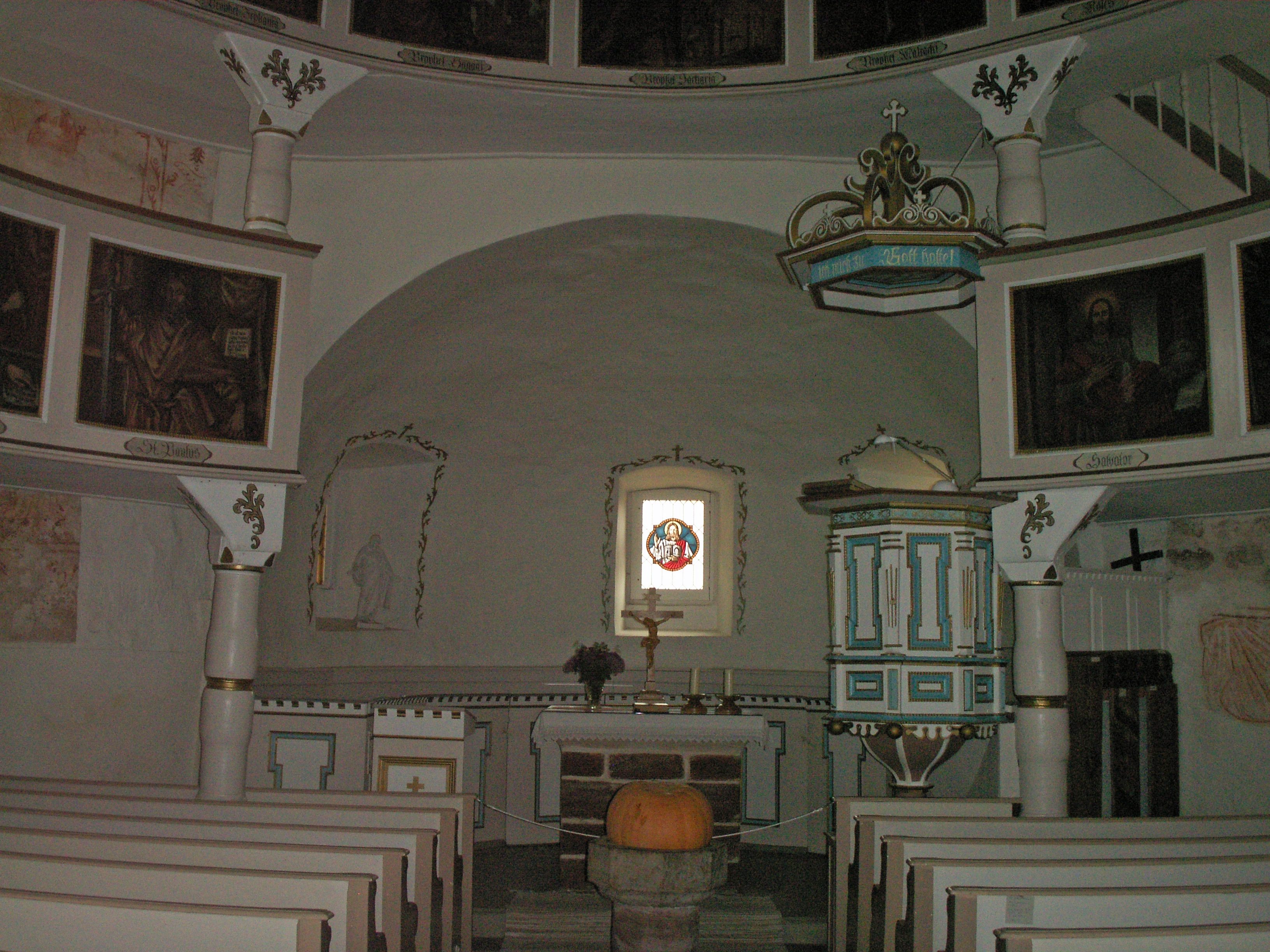 Rundkirche Untersuhl, Innenraum mit barocker Ausgestaltung